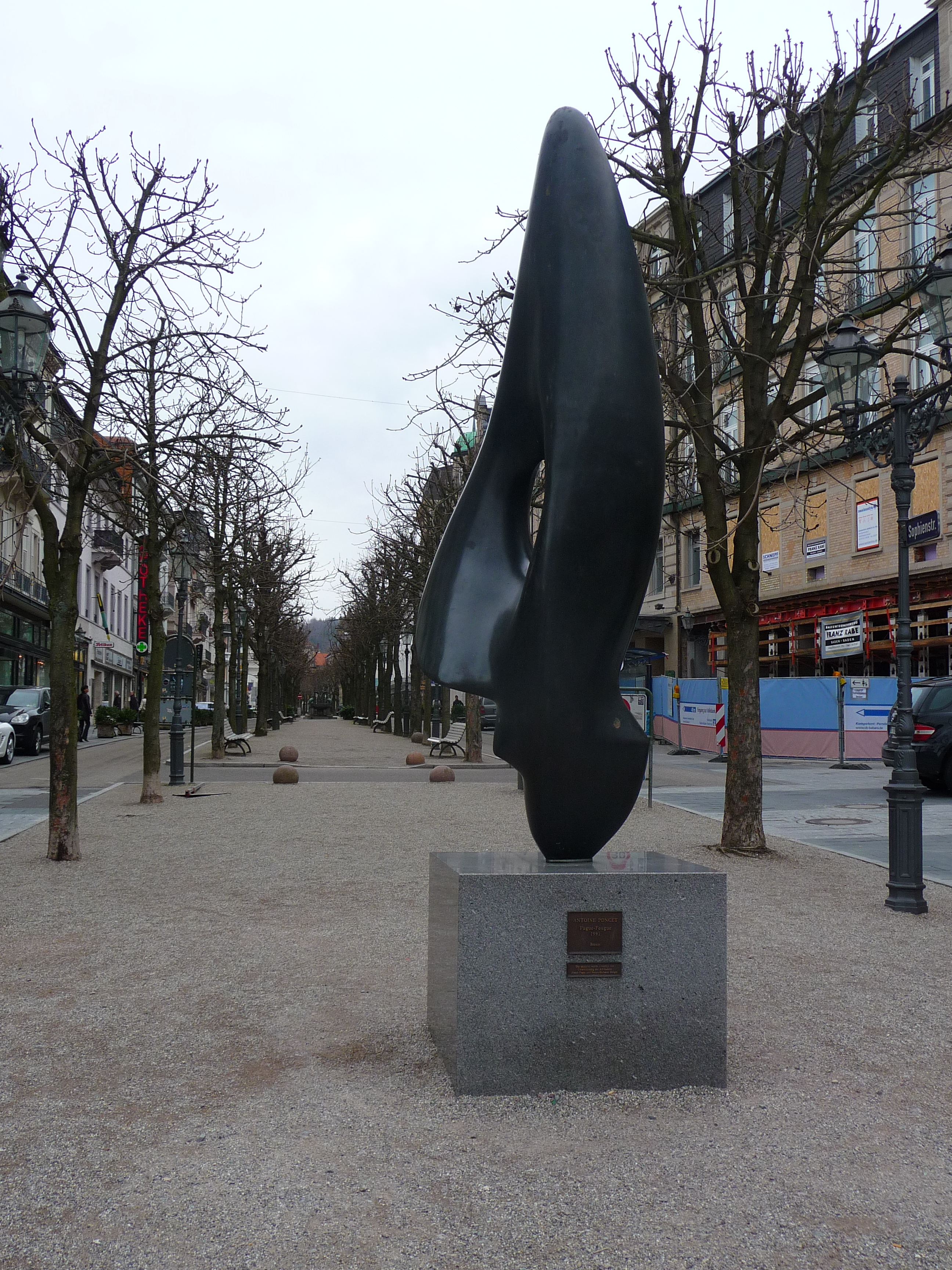 Bronzeskulptur Fugue-Fougue von Antoine Poncet, aufgestellt in der Innenstadt von Baden-Baden